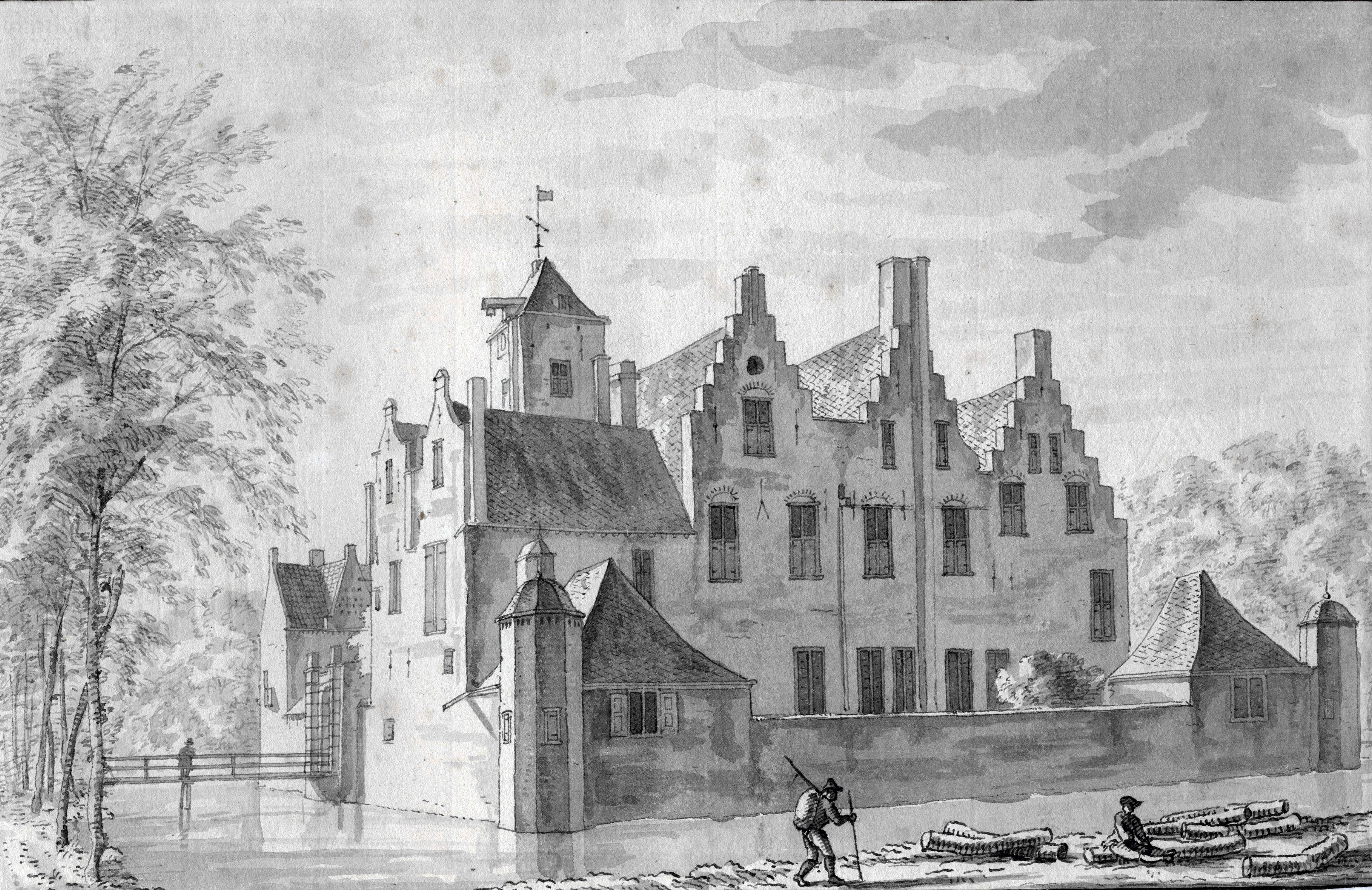 Het Huis Ter Noot aan de zuidzijde van de Bezuidenhoutseweg, ongeveer ter plaatse van de latere 1e en 2e Van den Boschstraat.